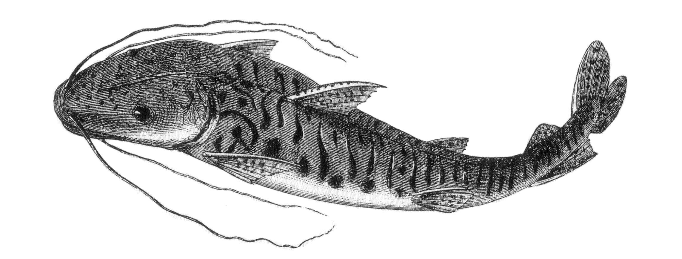 "Surubim (Pimelodus tigrinus)" = Pseudoplatystoma tigrinum Valenciennes, 1840